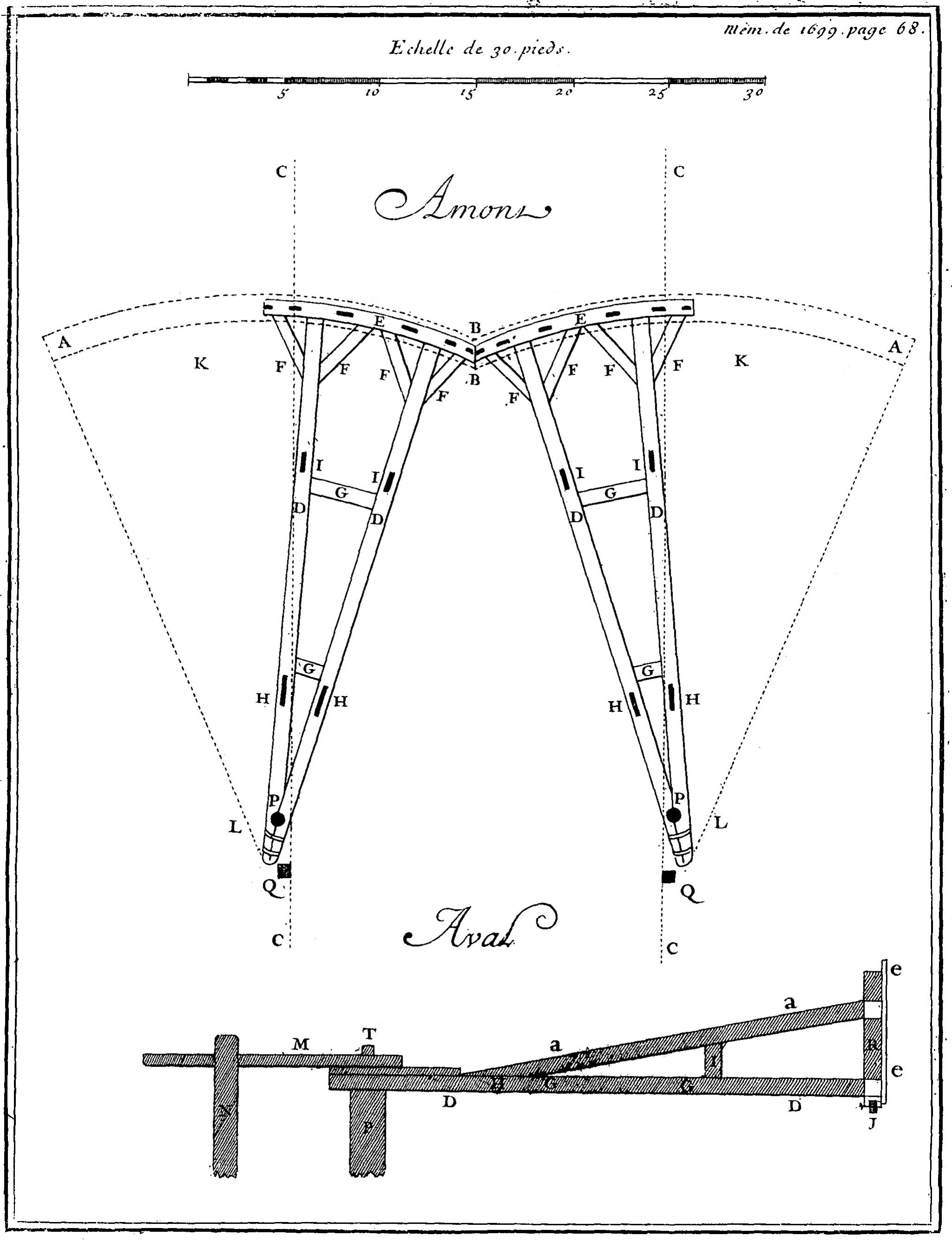 Plan géométral d'une porte d'écluse du canal de Sauvage selon l'invention de Artus Gouffier de Roannez, publié dans les mémoires de l'Académie royale des sciences en 1699.